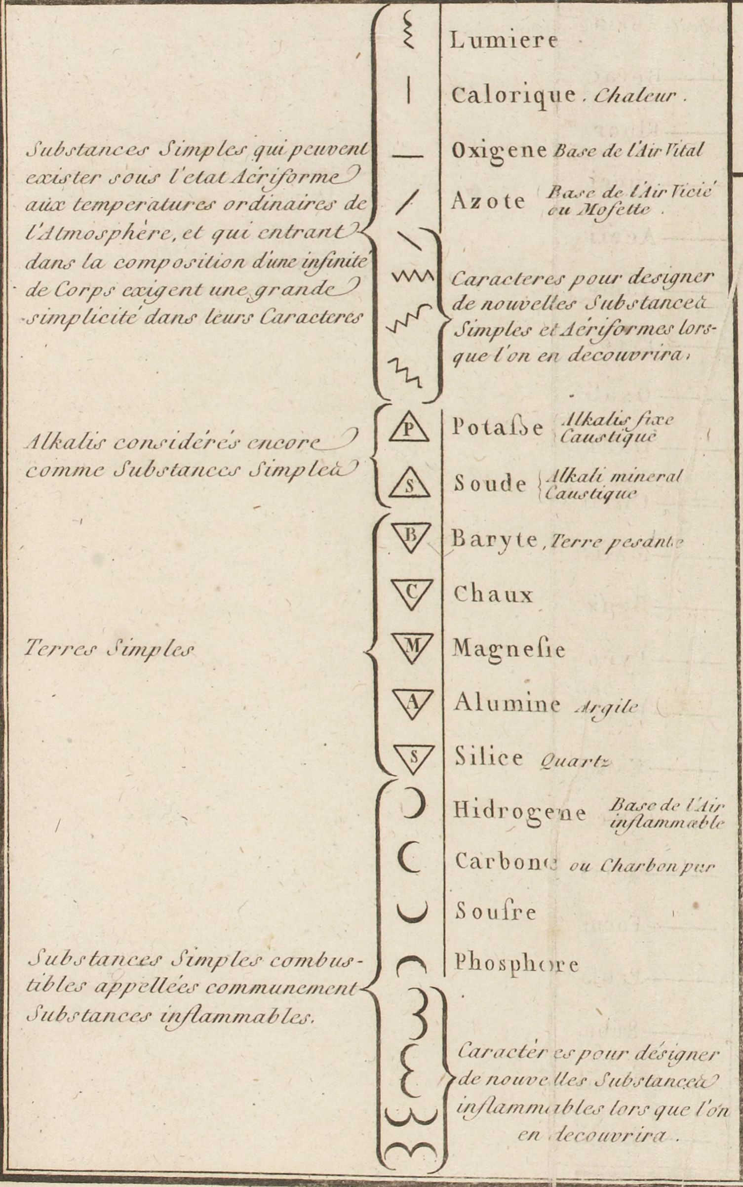 Fragment de la Taula 1 on hi ha la relació de substàncies simples amb els seus símbols del llibre Méthode de Nomenclatura Chimique